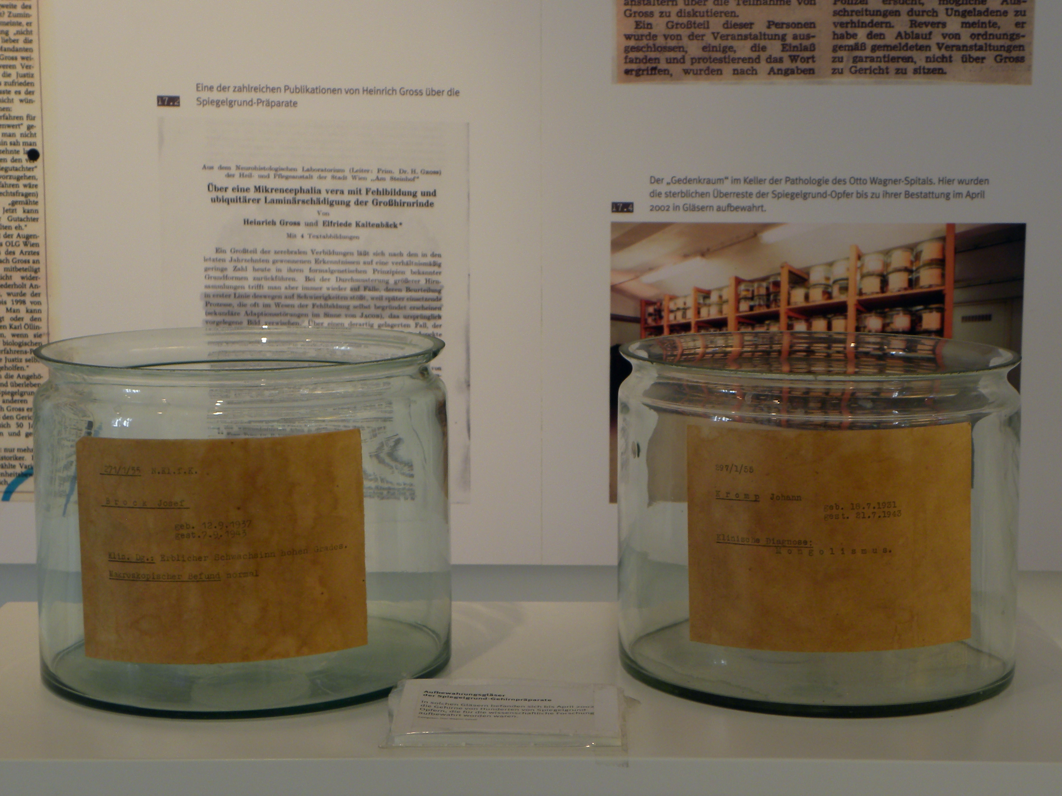 Gehirne hunderter am Spiegelgrund ermordeter Kindern wurden in solchen Gläsern für die wissenschaftliche Forschung konserviert und auch nach 1945 noch bis in die Achtzigerjahre für neuropathologische Forschungen verwendet - zunächst vom "Neurohistologischen Laboratorium", danach im "Ludwig Boltzmann Institut zur Erforschung von Missbildungen des Zentralnervensystems". Die Kindergehirne wurden bis April 2002 im Keller der Prosektur aufbewahrt und erst danach in einem Ehrengrab am Zentralfriedhof bestattet. Später gefundene Spiegelgrund-Präparate und Überreste von Opfern wurden im Mai 2012 bestattet. Teil der Ausstellung "Der Krieg gegen die Minderwertigen" des Österreichischen Dokumentationsarchivs im V-Gebäude. Gedenkstätte Steinhof